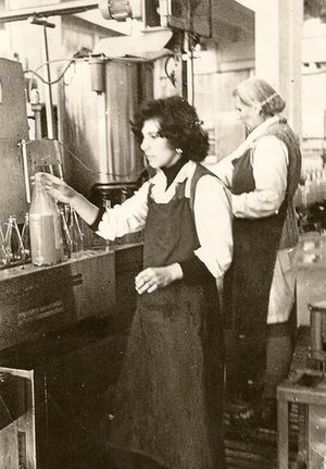 Производство на безалкохолни напитки в Завод за безалкохолни напитки БЕНАКС - София.